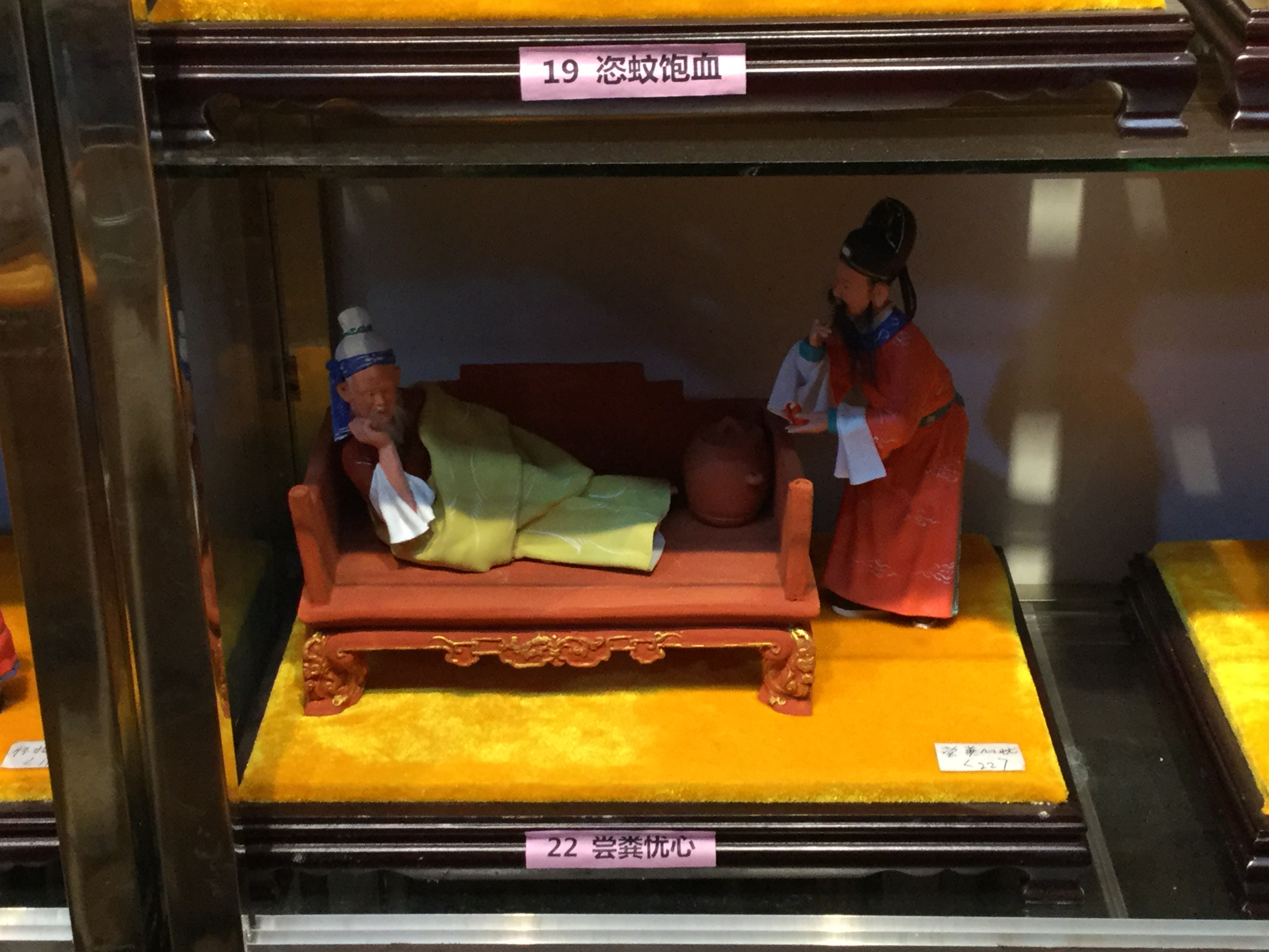 翁仔灯《尝粪忧心》，摄于2018年3月2日。